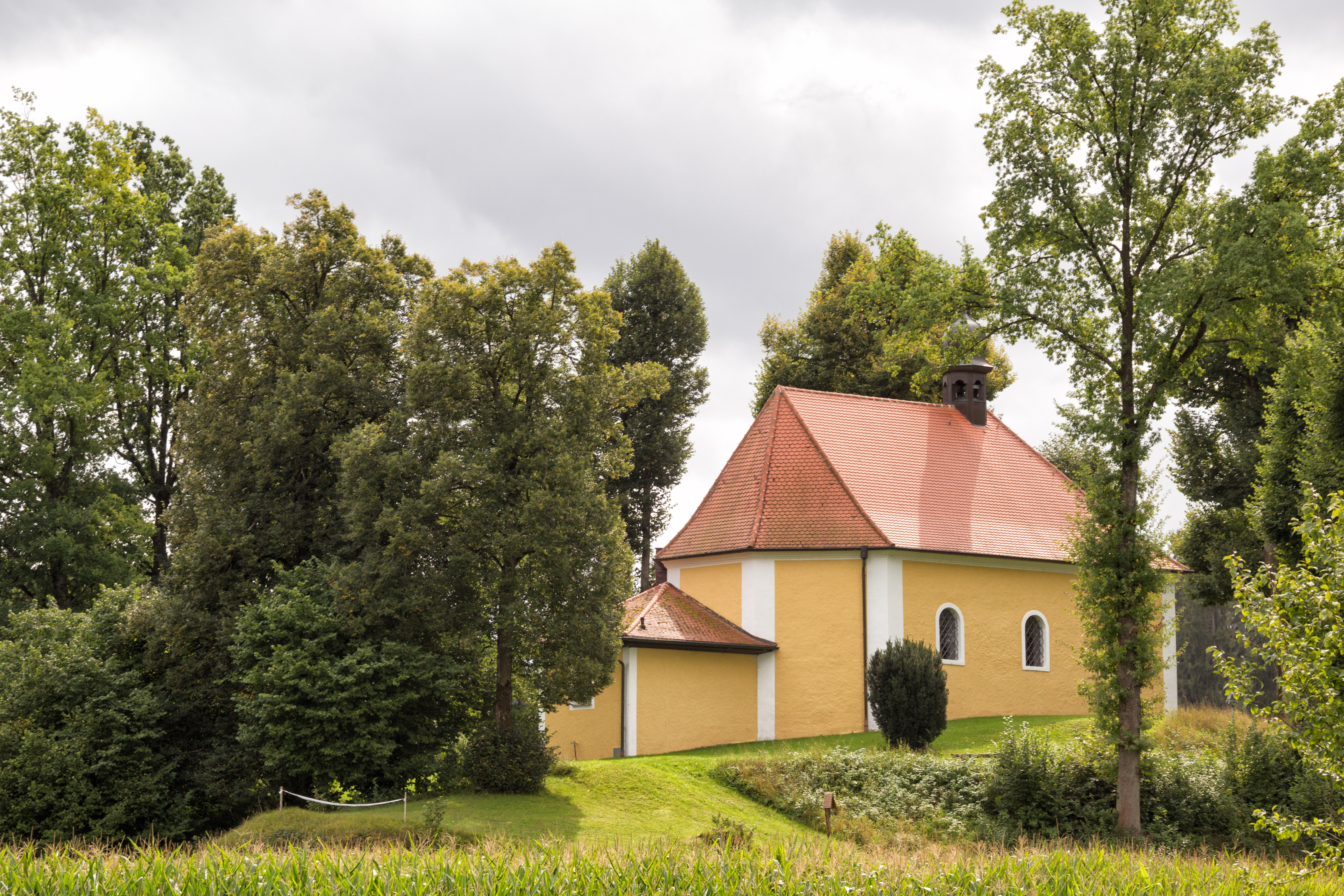 Katholische Kapelle St. Maria Magdalena, verputzter, dreiseitig geschlossener Massivbau mit Walmdach und Zwiebeldachreiter, bezeichnet mit „1743“; mit AusstattungThis is a photograph of an architectural monument.